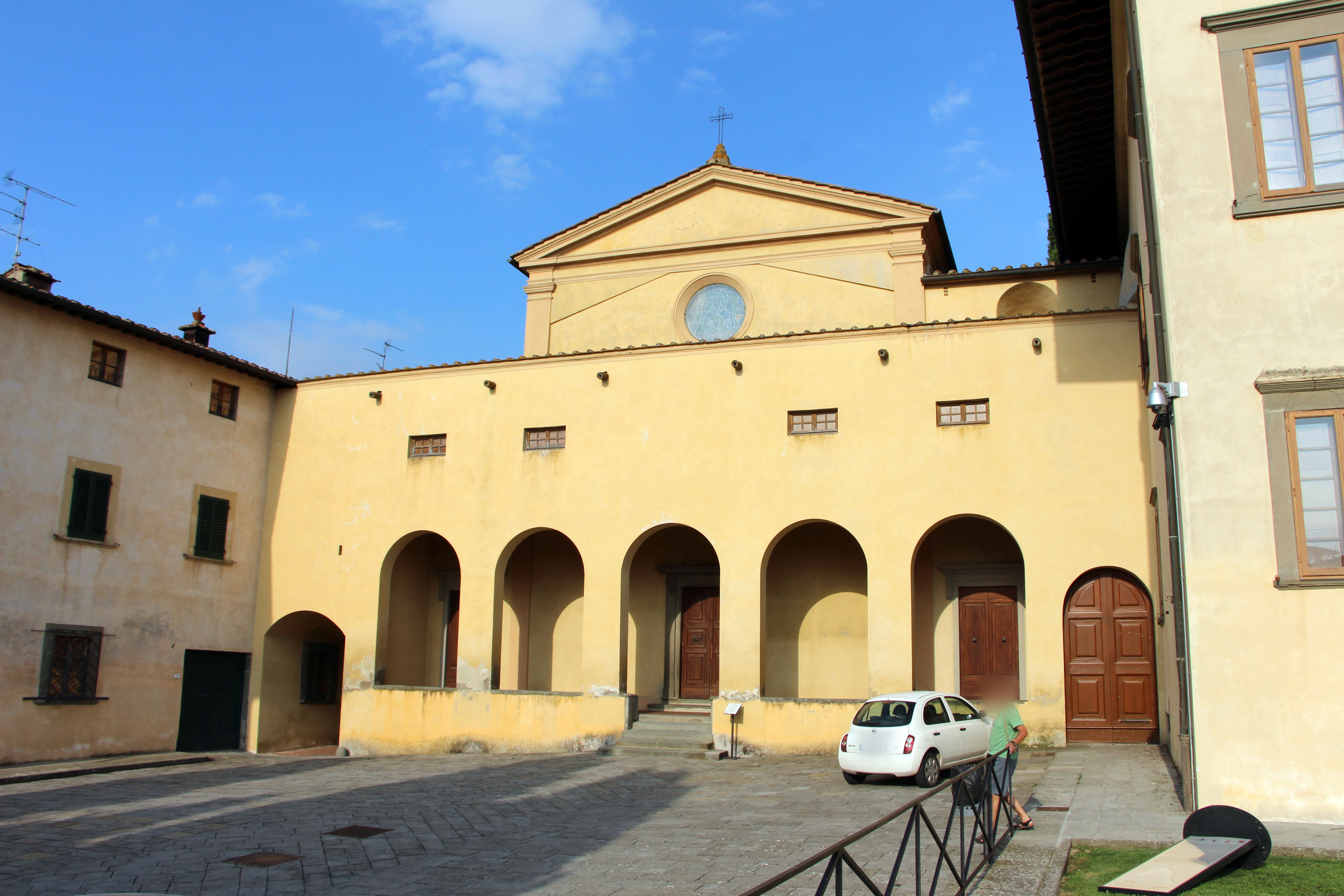 Cerreto Guidi The making of this document was supported by Wikimedia CH. (Submit your project!) For all the files concerned, please see the category Supported by Wikimedia CH.